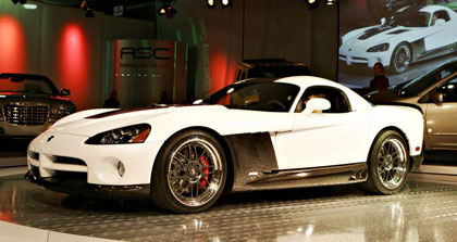 Viper